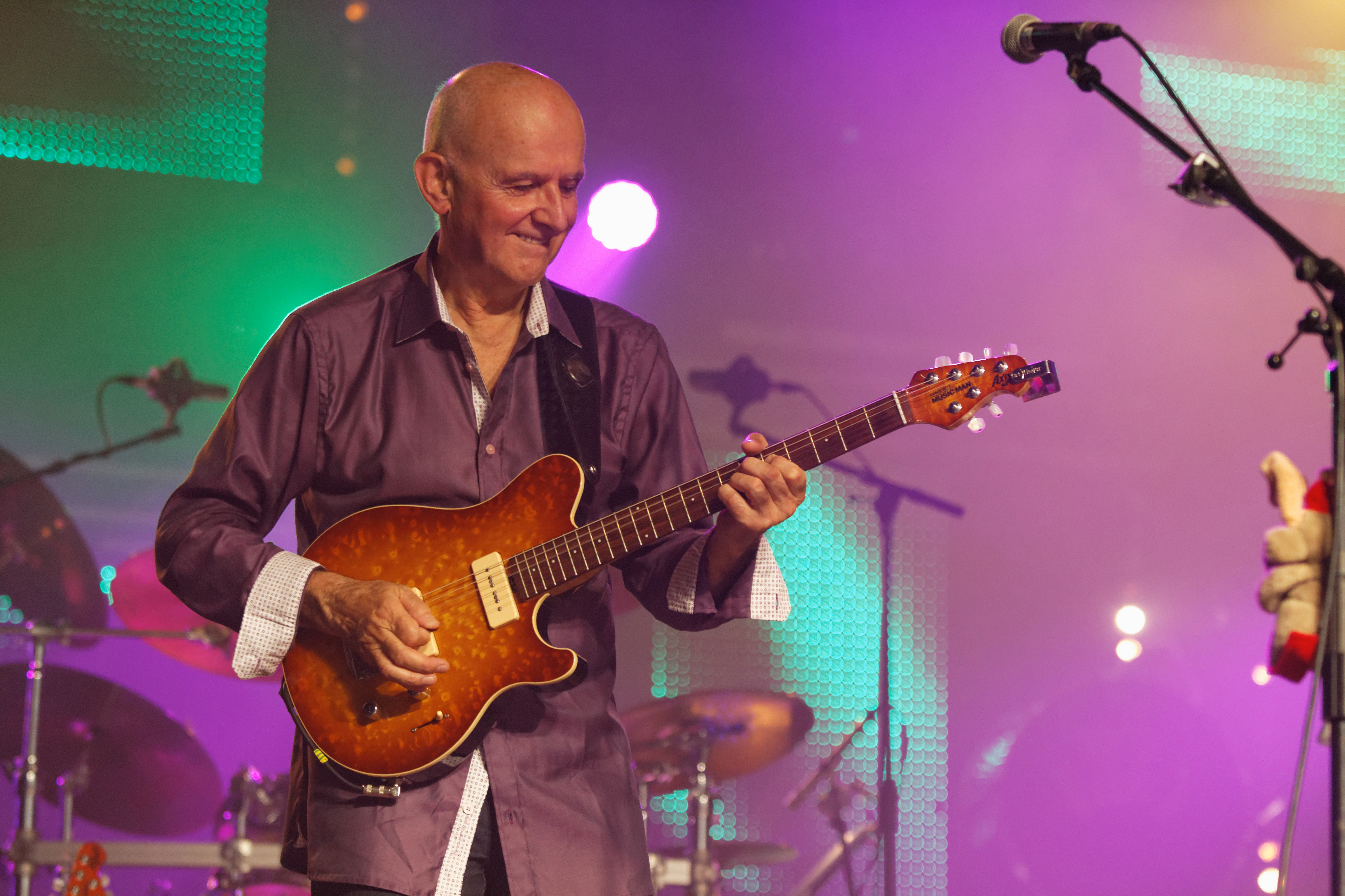 Dan Ar Braz et le bagad Kemper en concert à l'espace Gradlon lors du festival de Cornouaille 2013, à l’occasion des 90 ans du Cornouaille et des 20 ans de la création de l’Héritage des Celtes.